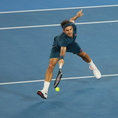 2019 Australian Open